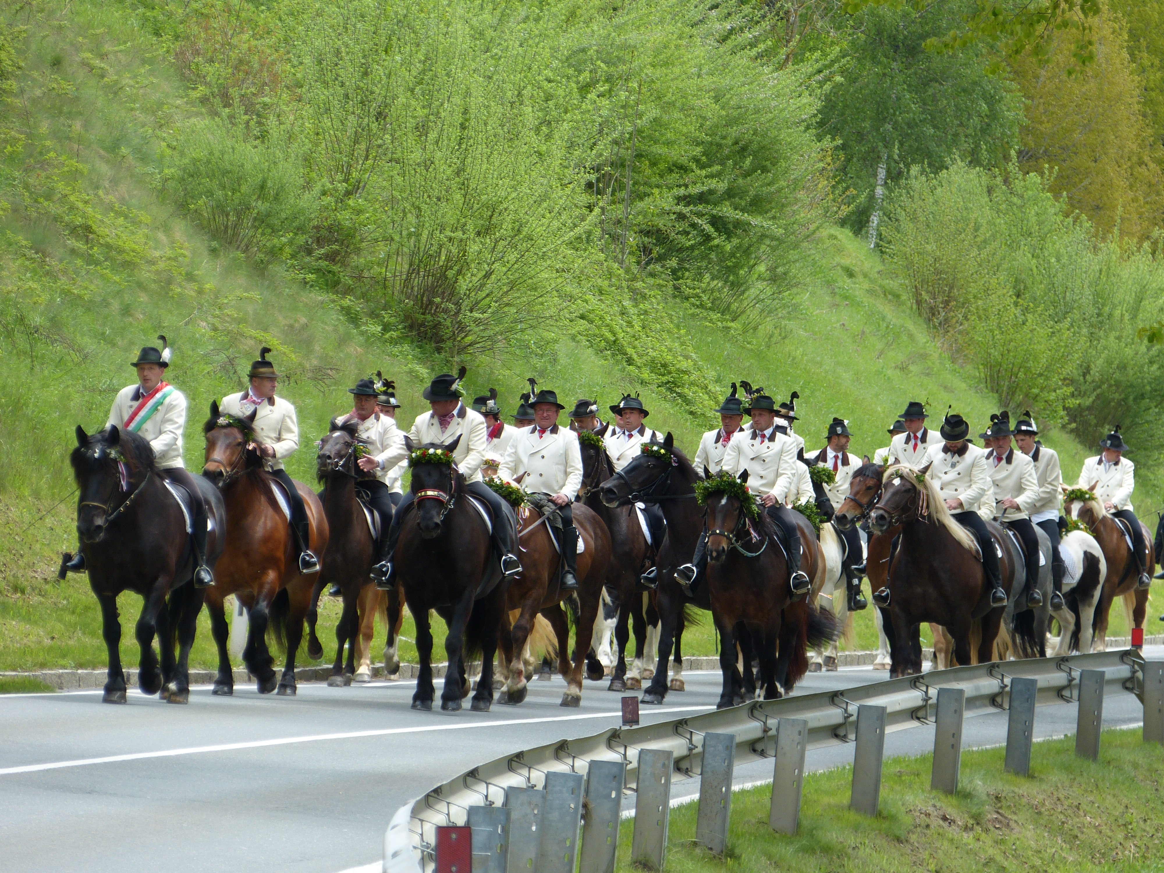 Kranzlreiten, Gemeinde Weitensfeld, Kärnten. Pfingstsonntag 2016.